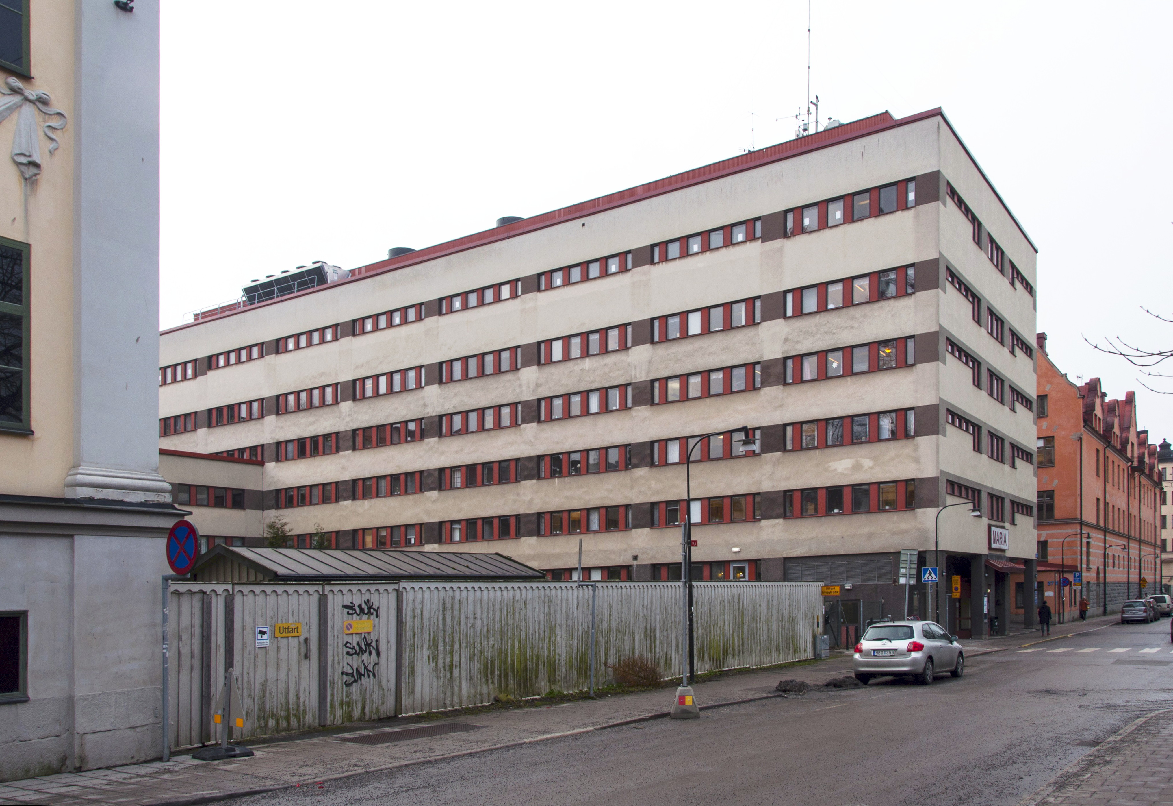 Maria Beroendecentrum, Wollmar Yxkullsgatan 25 Nybyggnadsår 1967 - 1970, Anders Diös AB (Byggmästare) Ervin Pütseps Arkitektkontor (Arkitekt) Stockholms Stad (Byggherre)